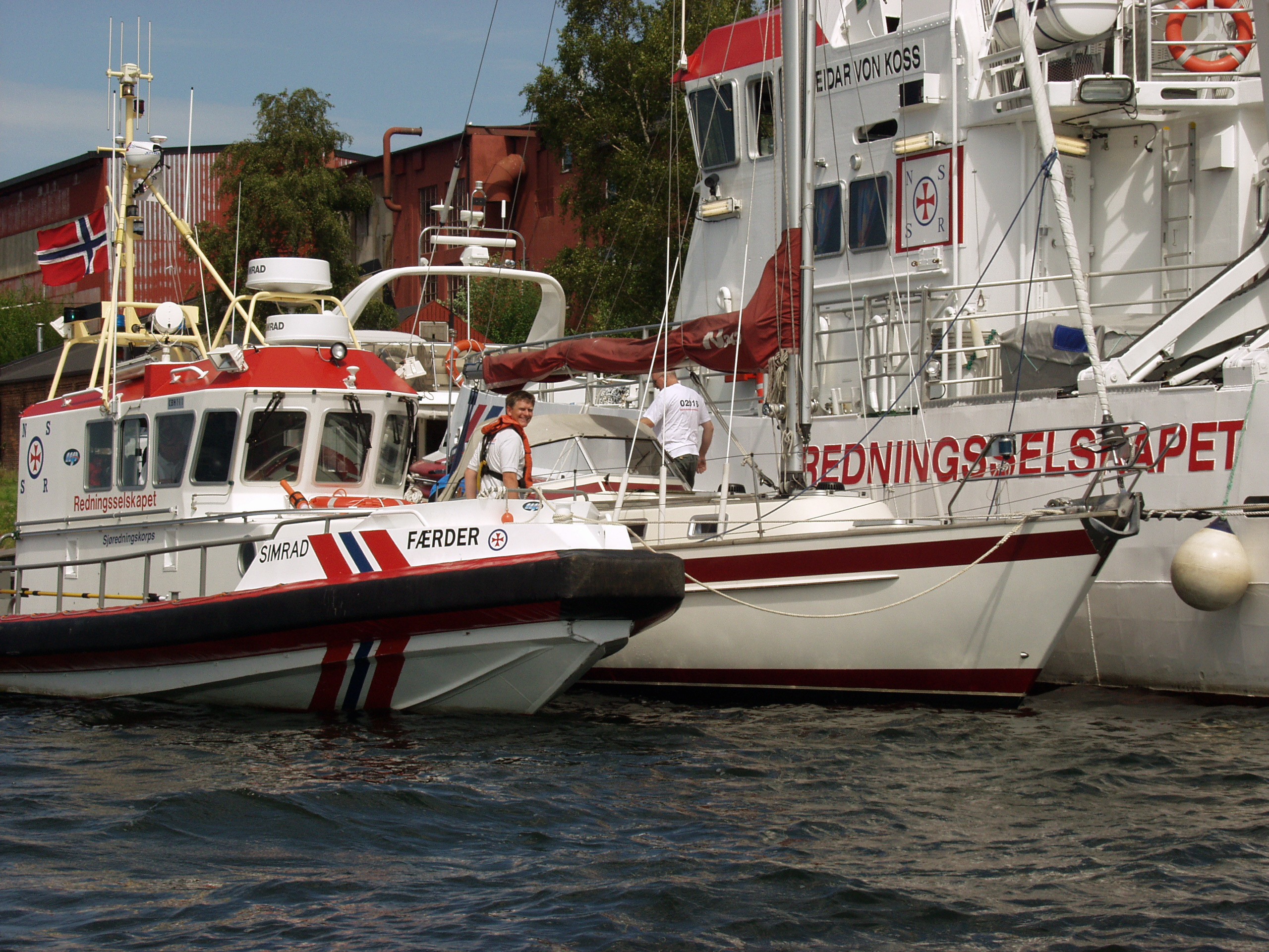 Bildet tatt 16. juli 2002. Tønsberg /Jarslø.